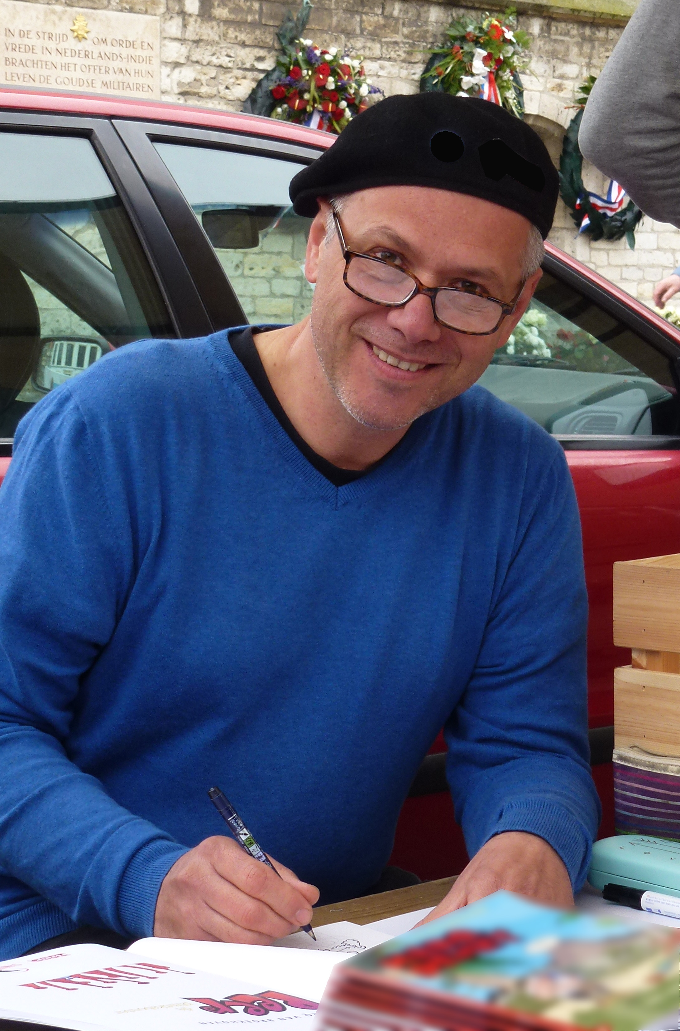 Foto genomen tijdens Strips op de Markt (Gouda, 7 mei 2017) Marq van Broekhoven (Eindhoven, 24 november 1960) is een Nederlandse striptekenaar en -scenarist, die vooral bekend is van de strips Jodocus de Barbaar, Peer de Plintkabouter en Marq denkt.